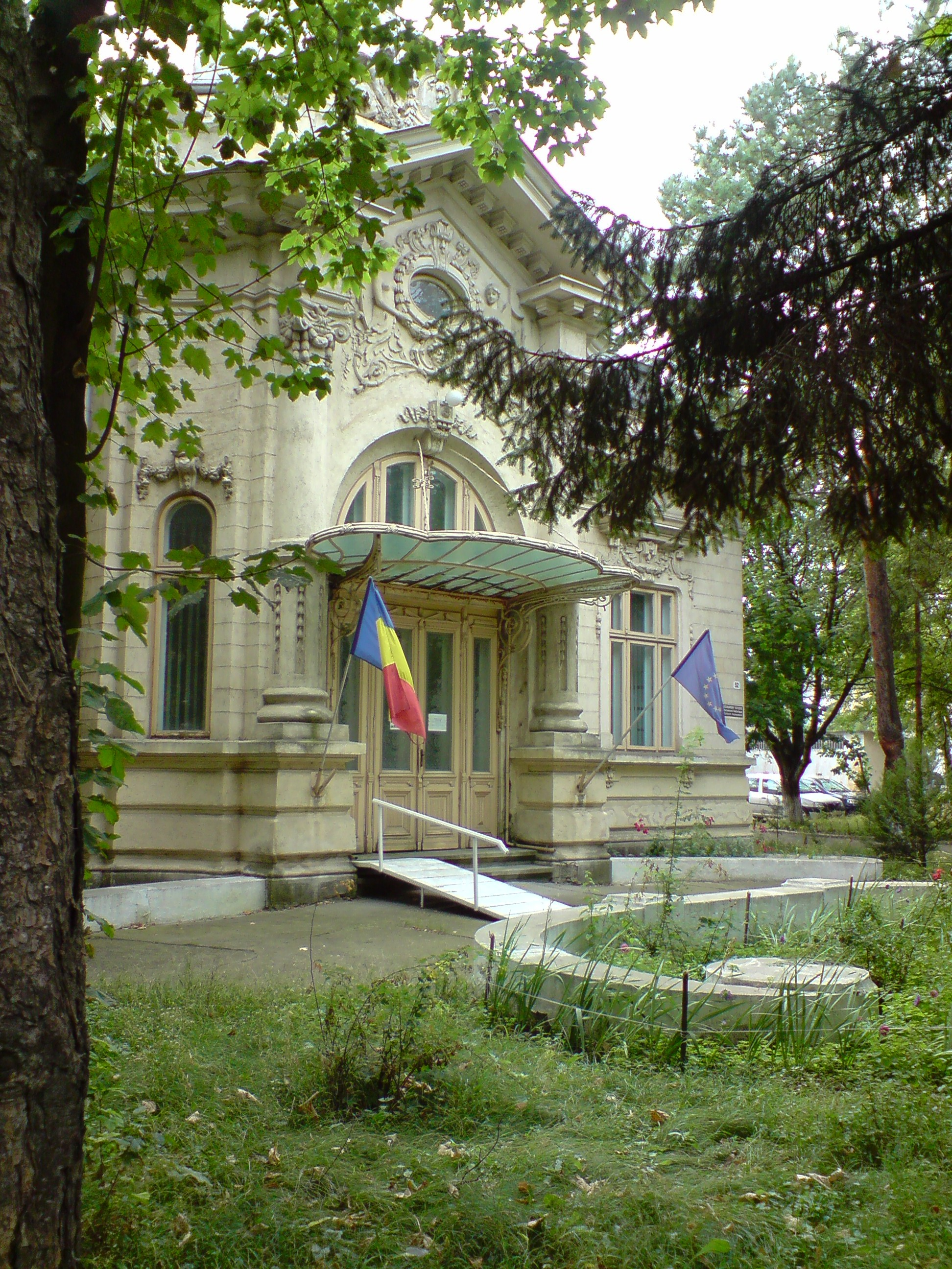 Botosani C.A.S